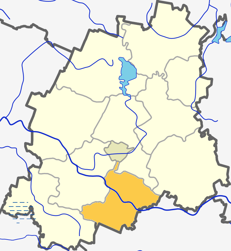 Расположение Сталгенайского староства на карте Плунгеского района